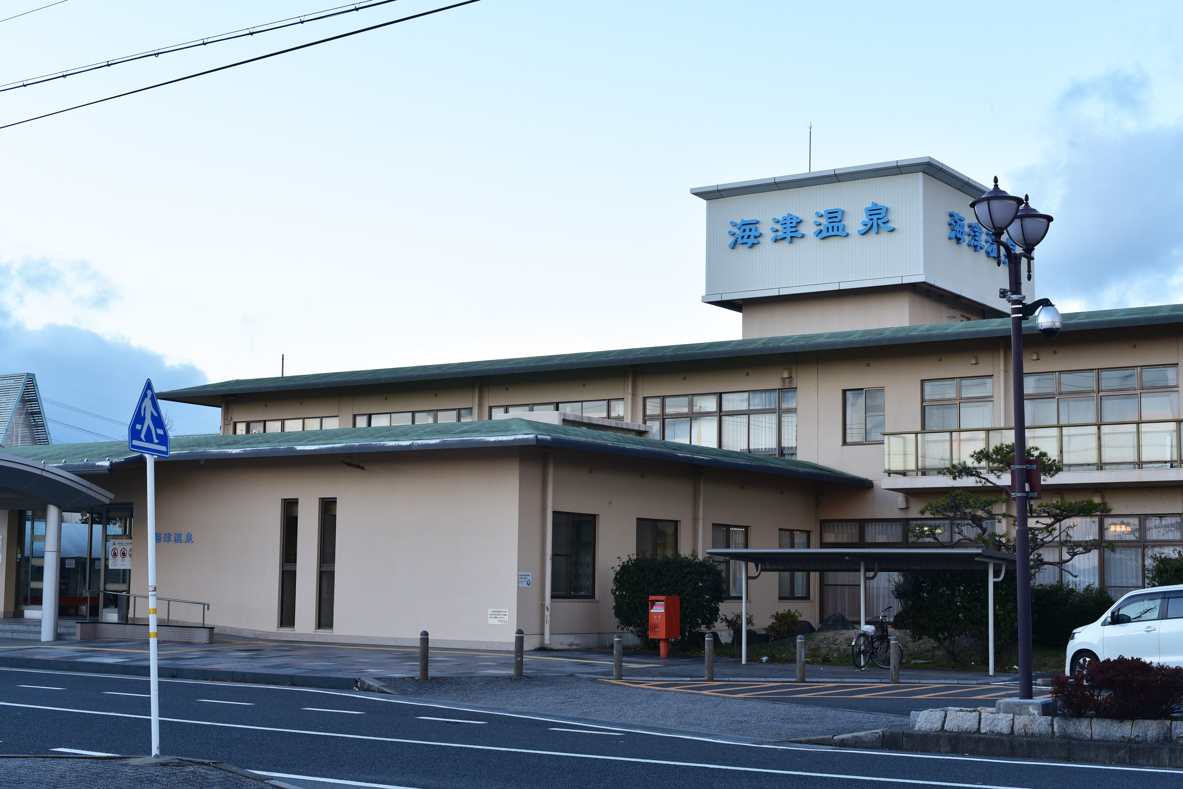 海津市にある海津温泉全景